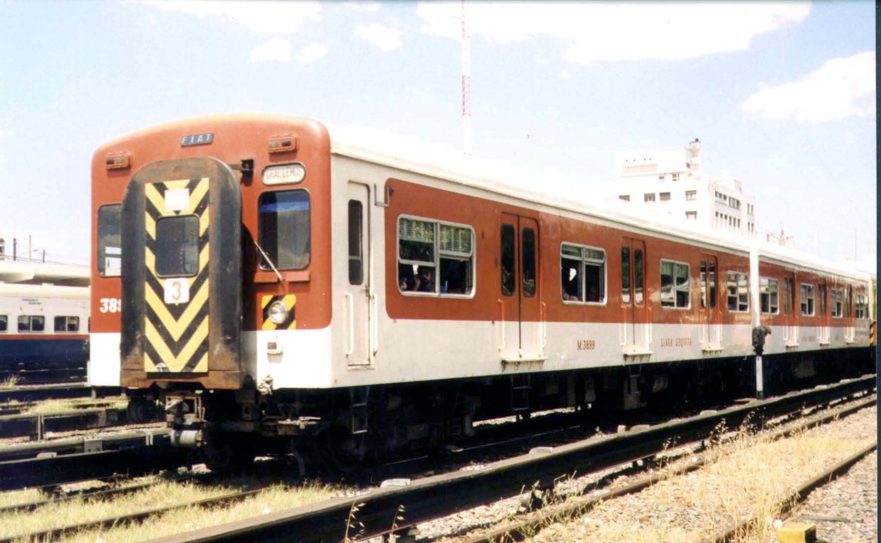 Tren eléctrico partiendo de estación Federico Lacroze. Año 1990.M 3899 Federico Lacroze